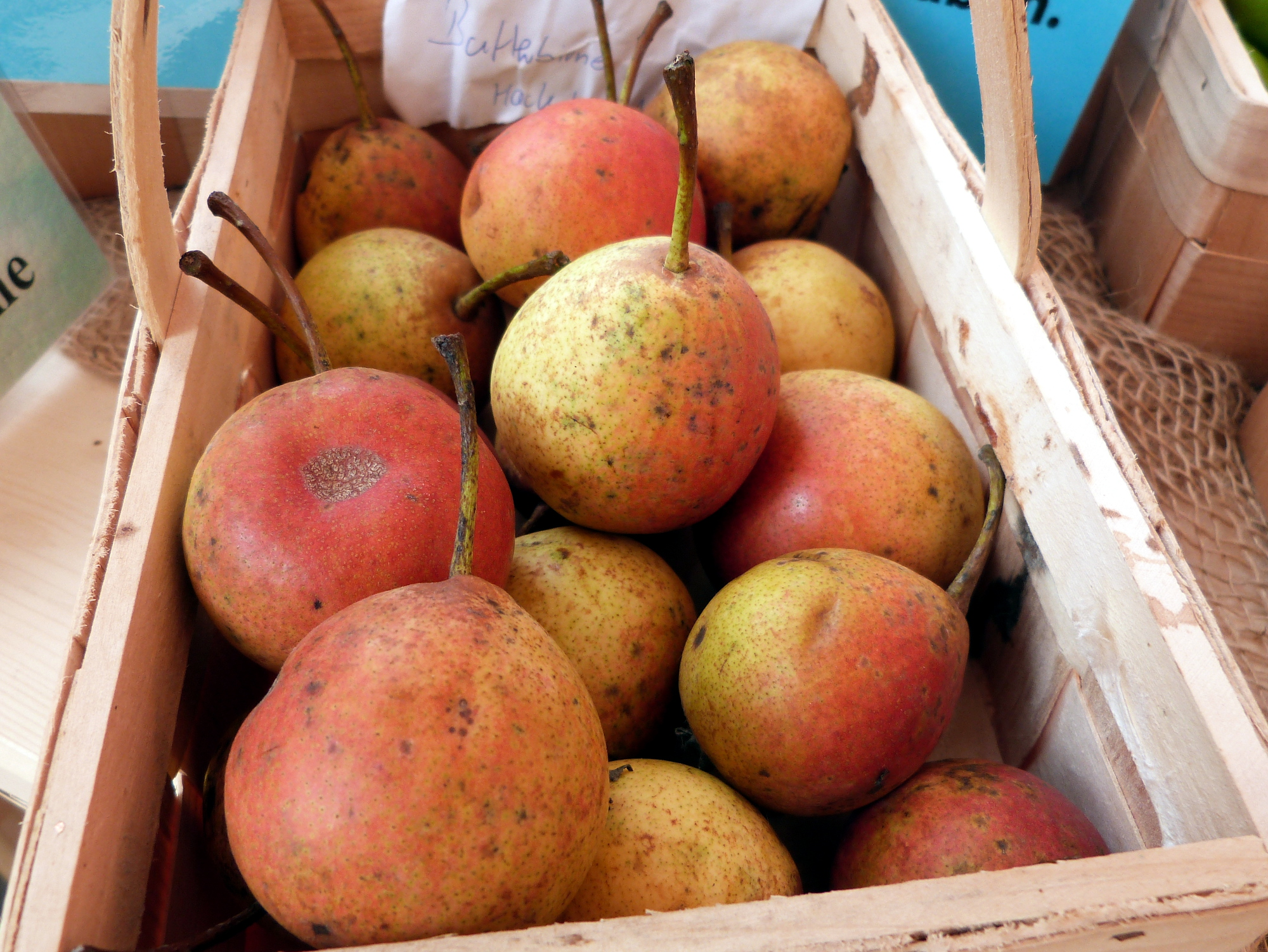 Birnen der Sorte Ulmer Butterbirne, Apfelwoche im Botanischen Garten Erlangen 2016, Ausstellung zusammengestellt durch das Obstinformationszentrum Fränkische Schweiz